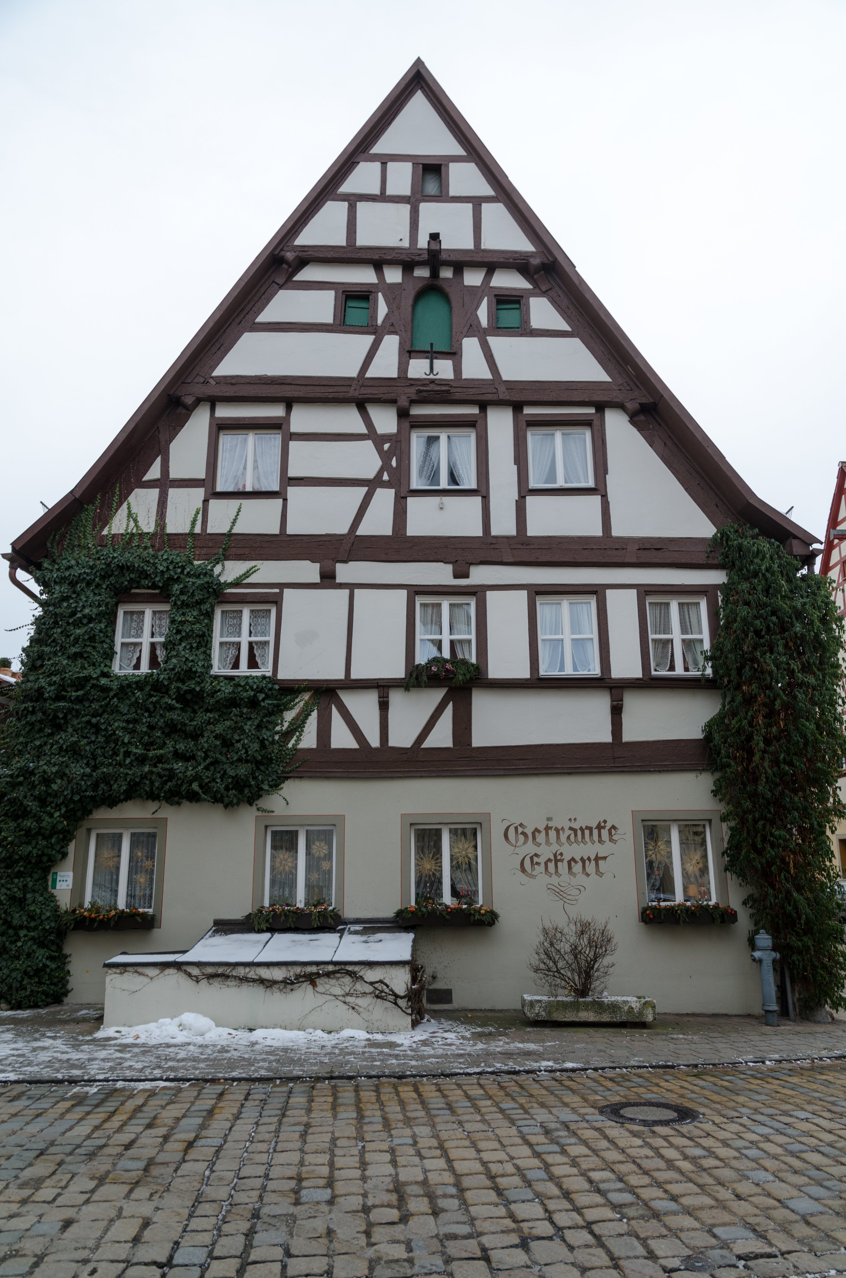 Weißenburg, Judengasse 26